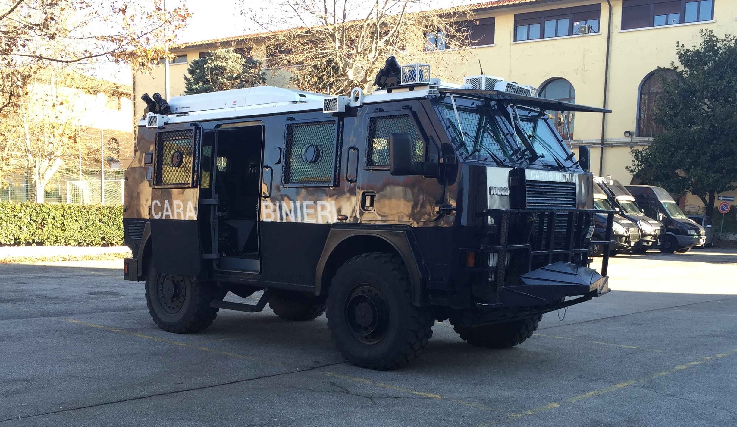 Un RG-12 dell'Arma dei Carabinieri - Lato/fronte